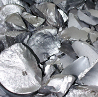 Поликремний компании НИТОЛ